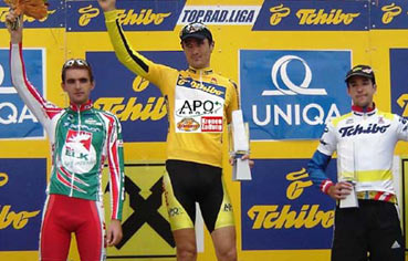 Sieger Jan Valach / Siegerehrung Tchibo Top Radliga 2006